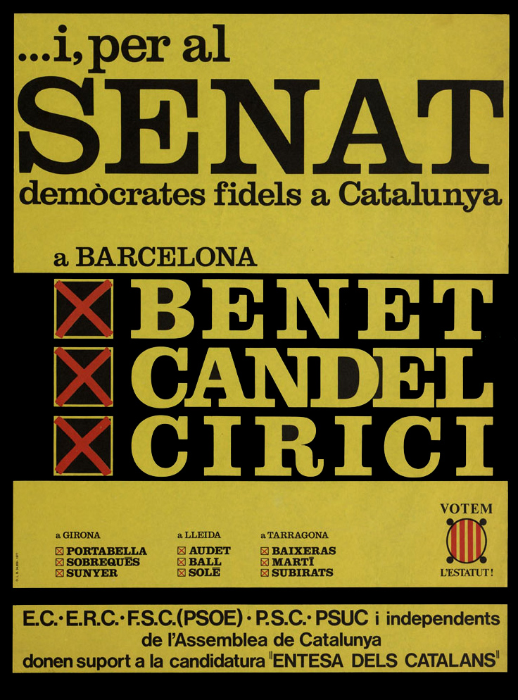 Cartell publicitari de la candidatura unitària de l'Entesa dels Catalans (Paco Candel, Alexandre Cirici, Josep Benet